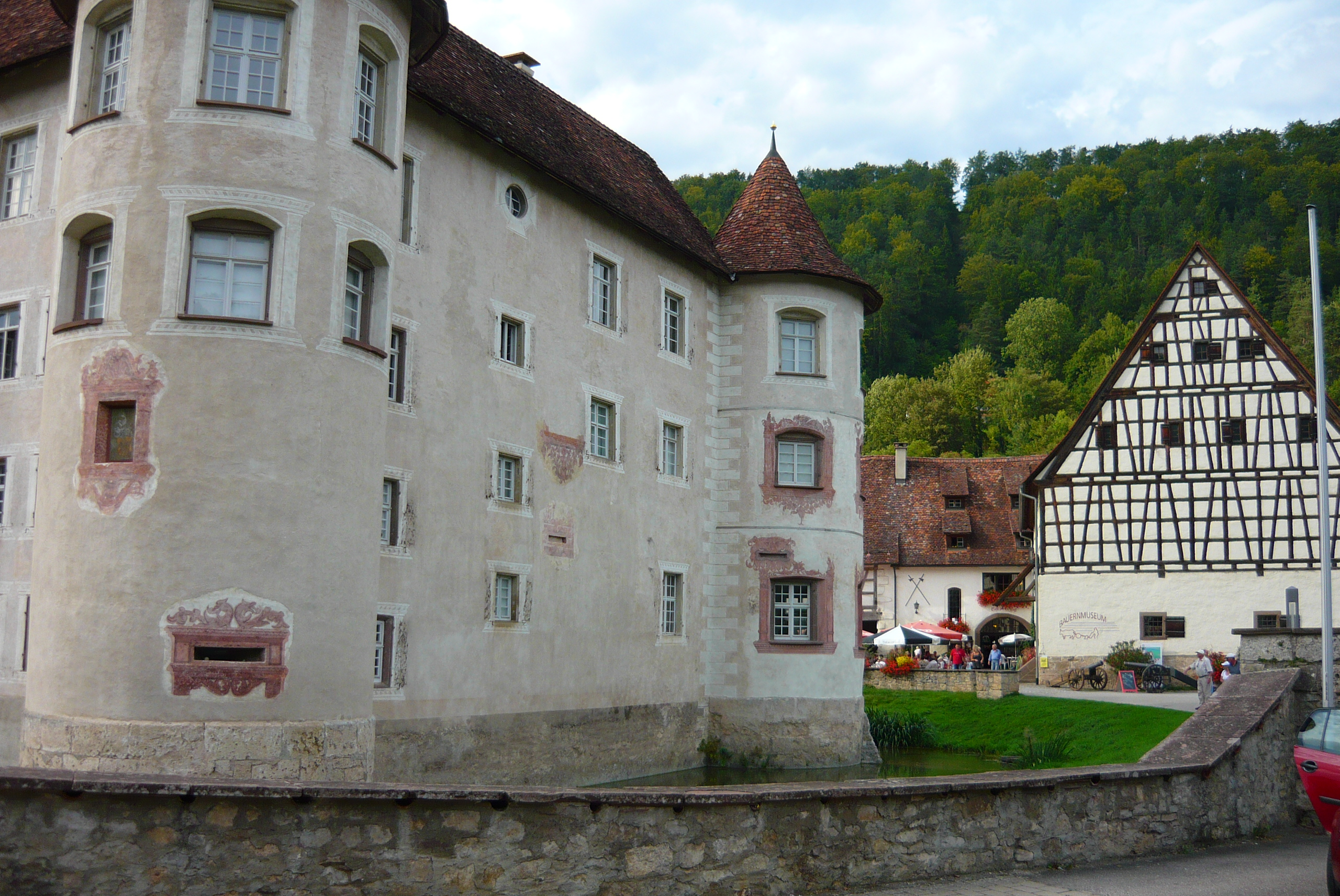 Wasserschloss Glatt mit Wirtschaftsgebäuden, Watercastle Glatt with the outhouses